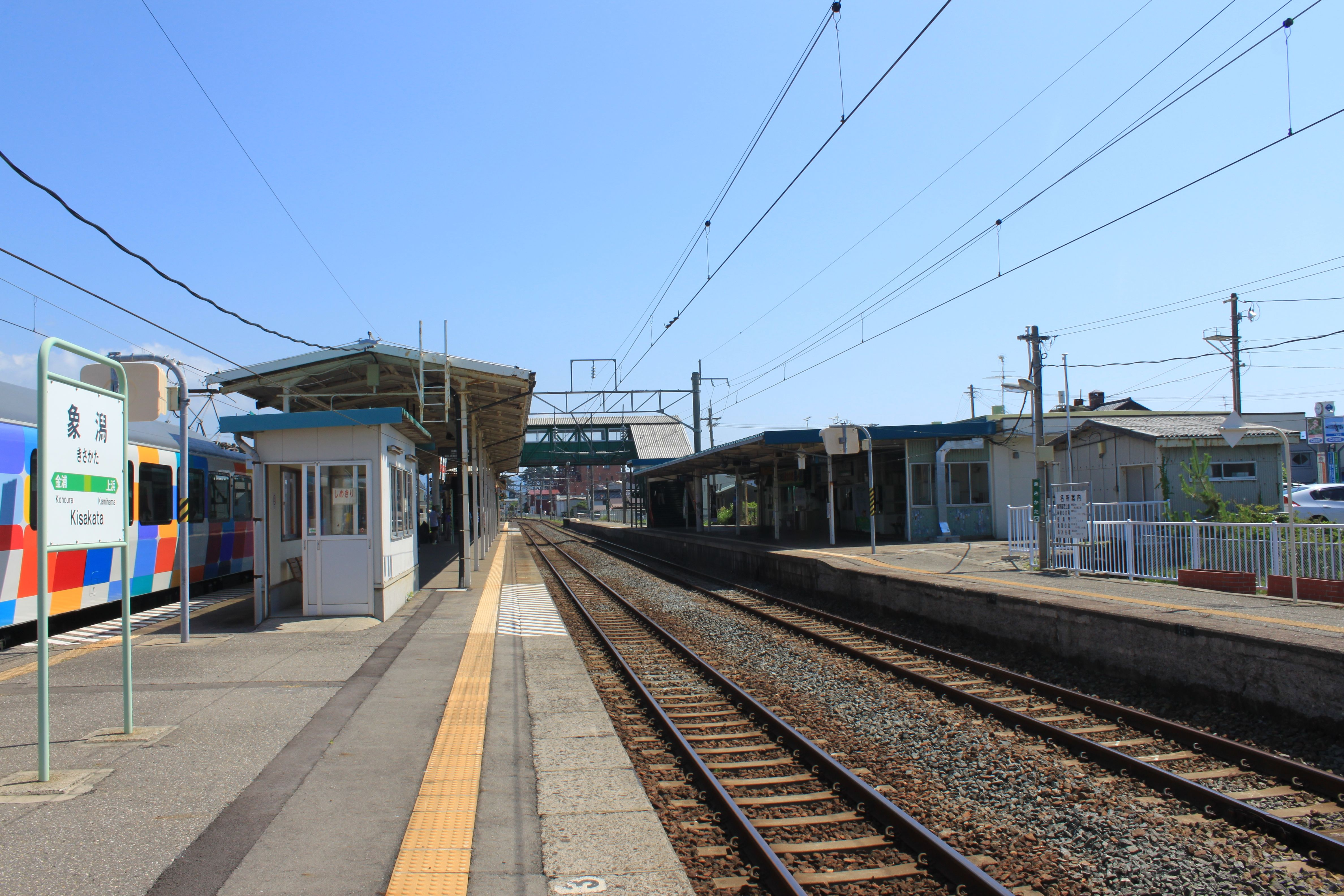 象潟駅